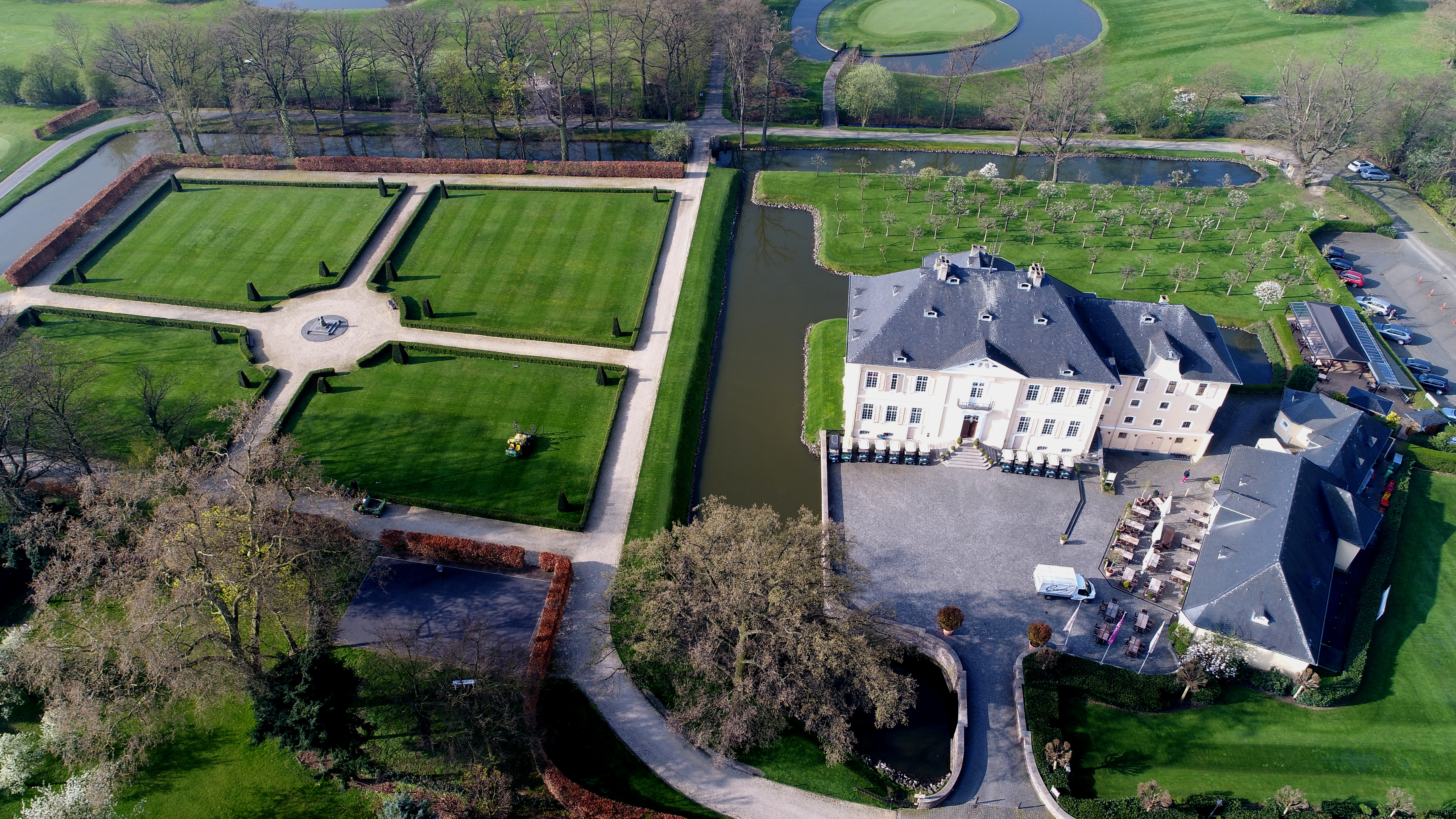 Schloss Miel aus der Vogelperspektive